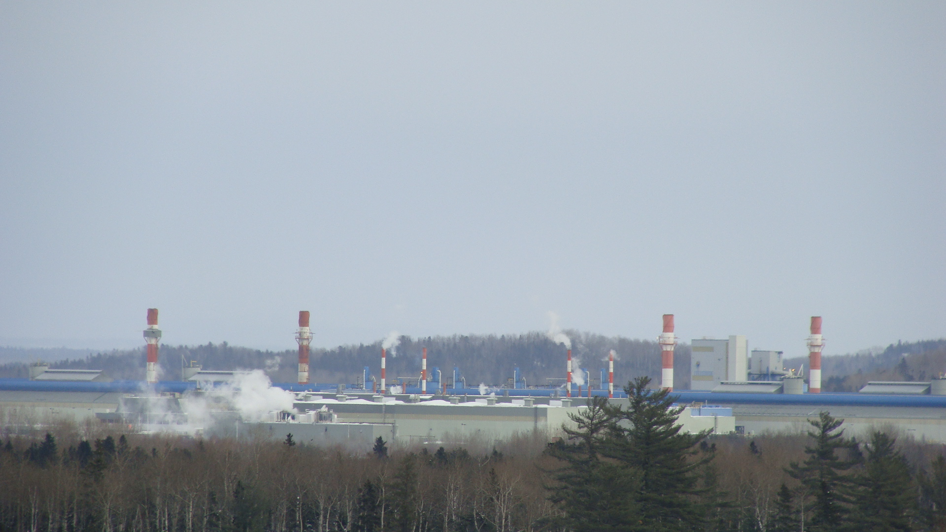 Usine Alcan à Laterrière, au Saguenay (Québec, Canada).